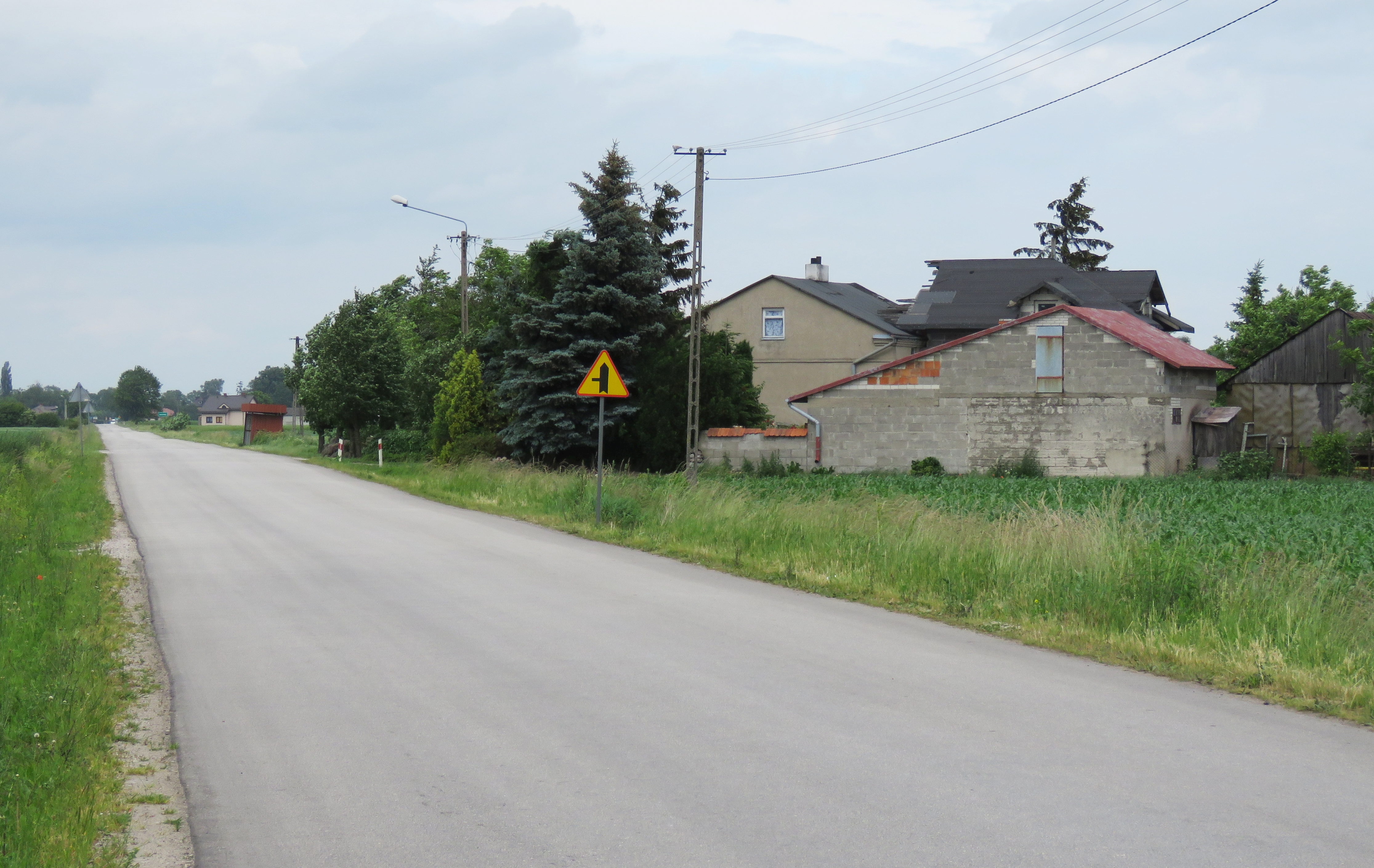 Cyganka, gmina Wiskitki